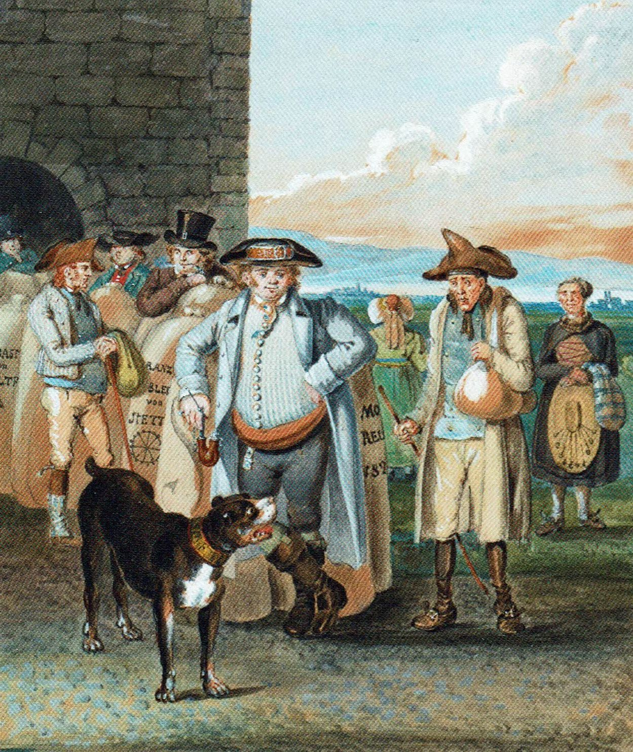 Bauern beim Abliefern des Zehnten. Gouache auf Papier. Links ein feister katholischer Oberschwabe, rechts ein armer protestantischer Altwürttemberger.